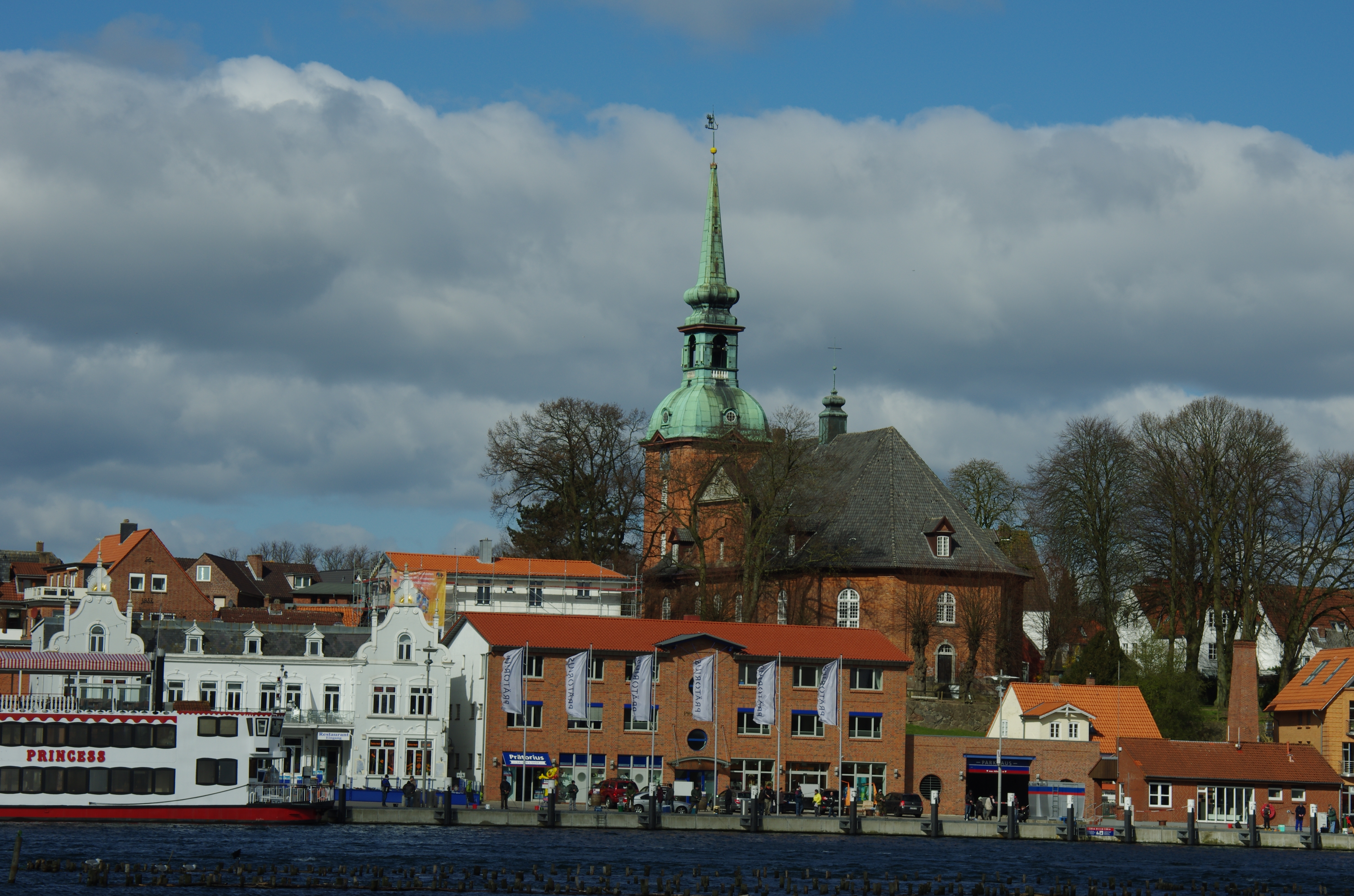 Kappeln in Schleswig-Holstein. Die Nikolei-Kirche vor dem Hafen als prägentes Element der Skyline.